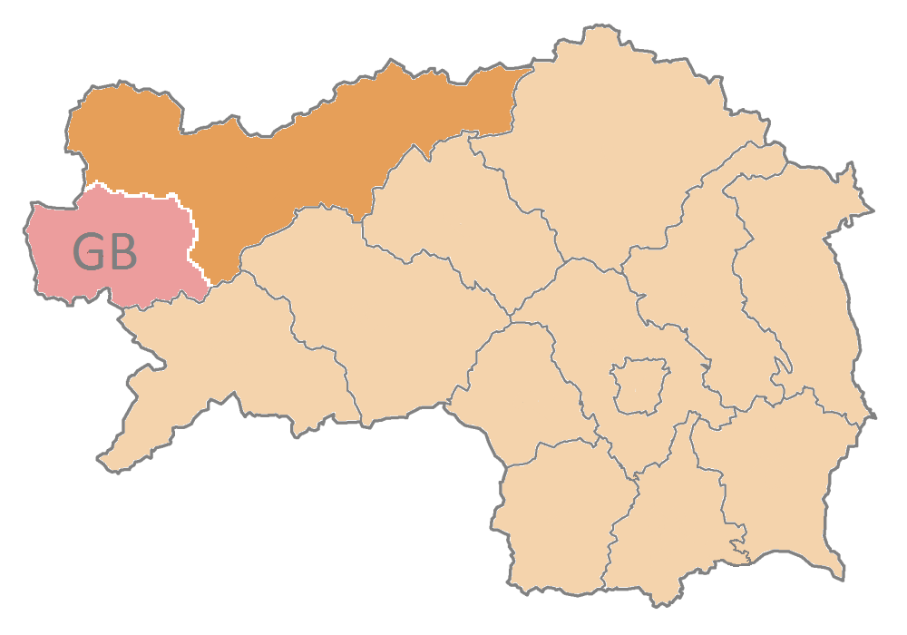 Karte: Politische Expositur Gröbming des Bezirk Liezen